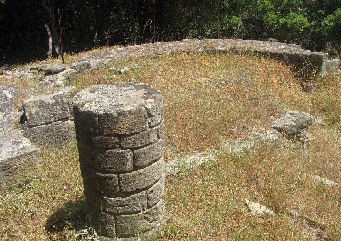 Vue des ruines de la Cursa, sur le flanc de la colline de Prunelli-di-Fiumorbo